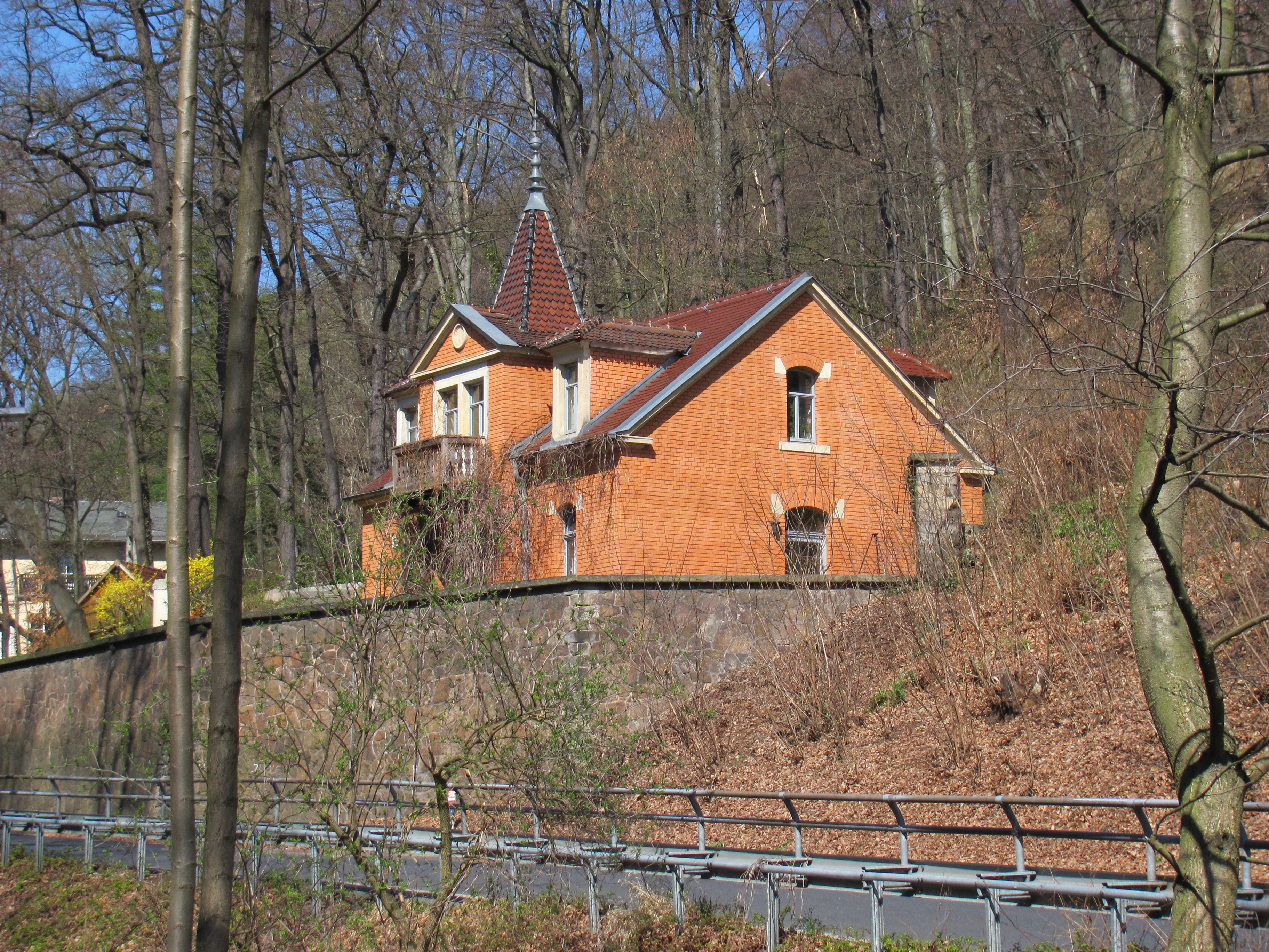 Radebeul, Wirtschaftsgebäude Villa Annabella